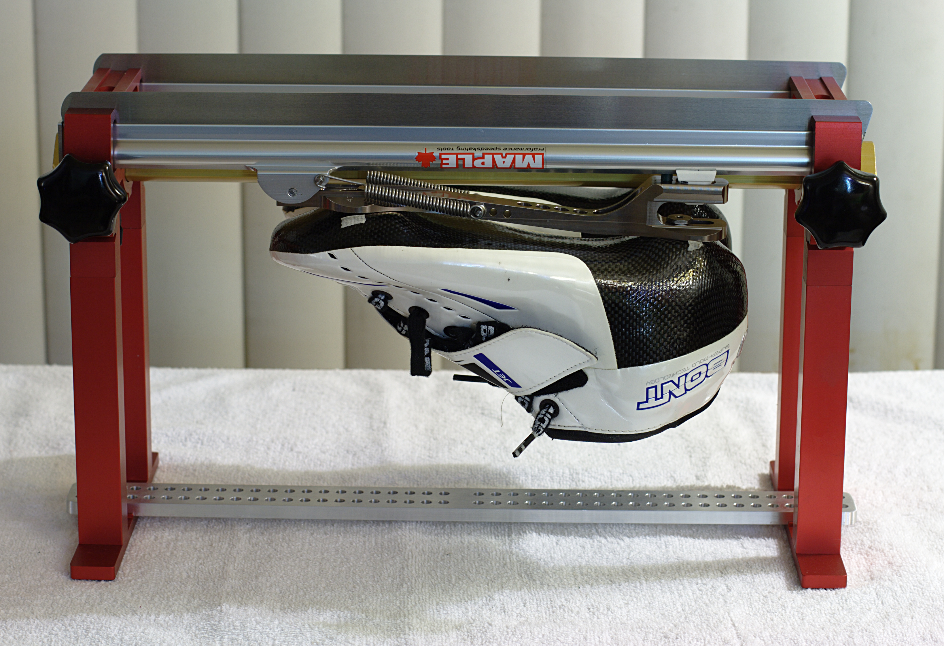 Speed Skates